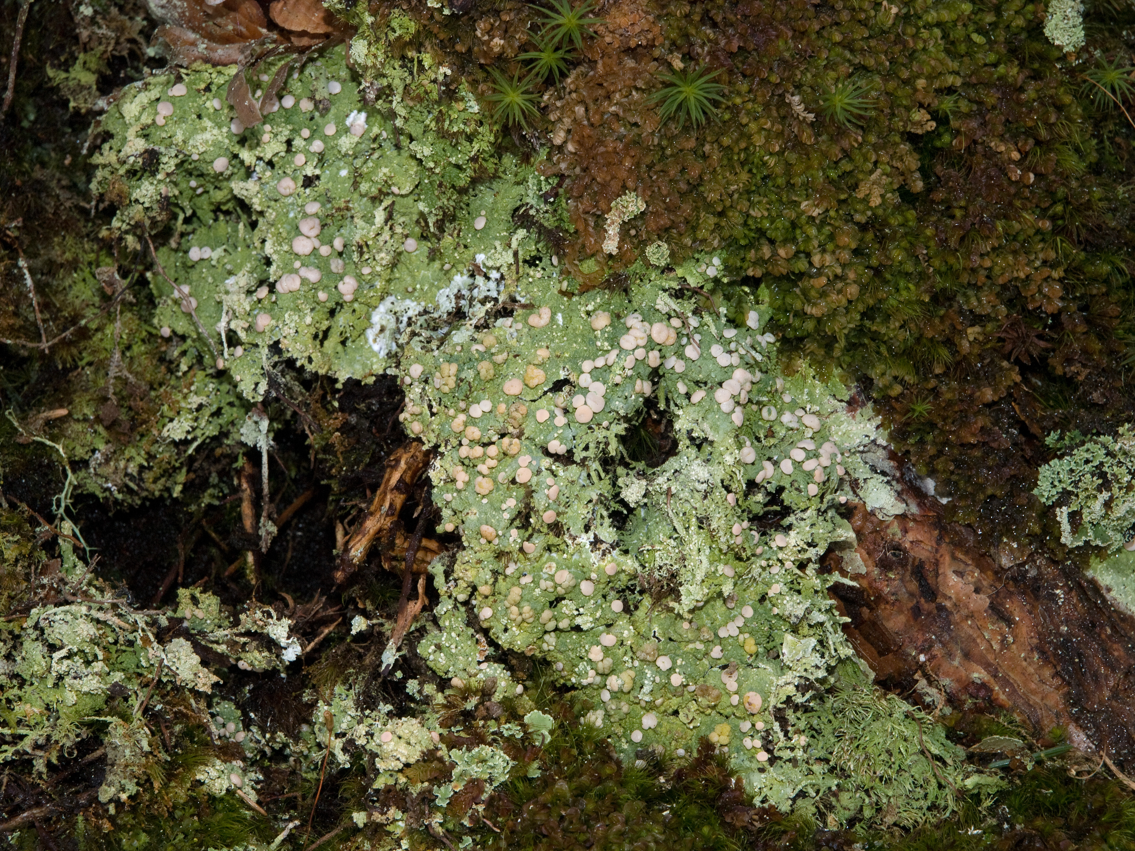 Heideflechte Icmadophila ericetorum Picture taken in Berchtesgaden/Bavaria